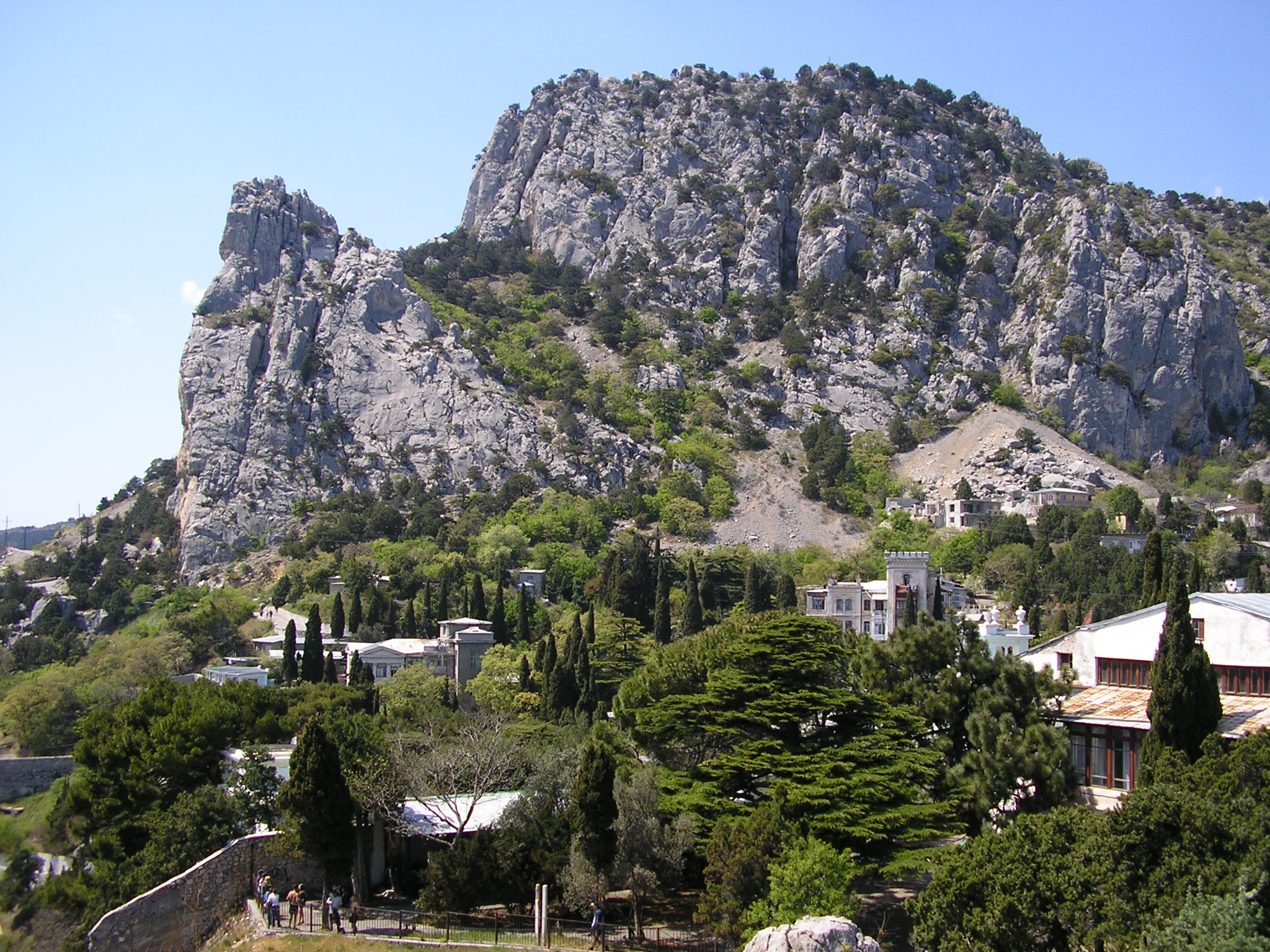 Гора Кошка, Симеиз, Крым